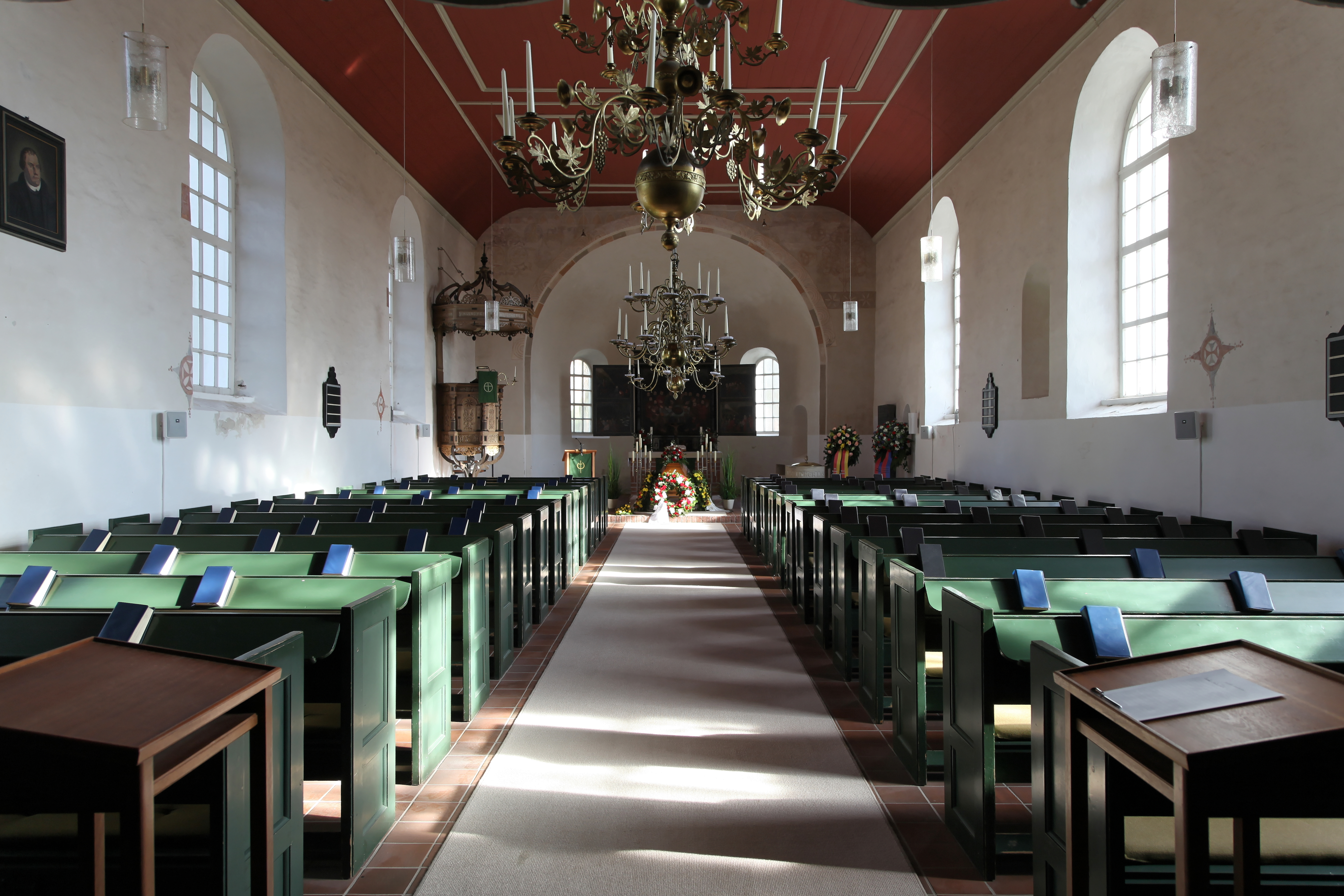 Kirche St. Laurentius und St.Vincentius, Groot Karkweg in Rhauderfehn